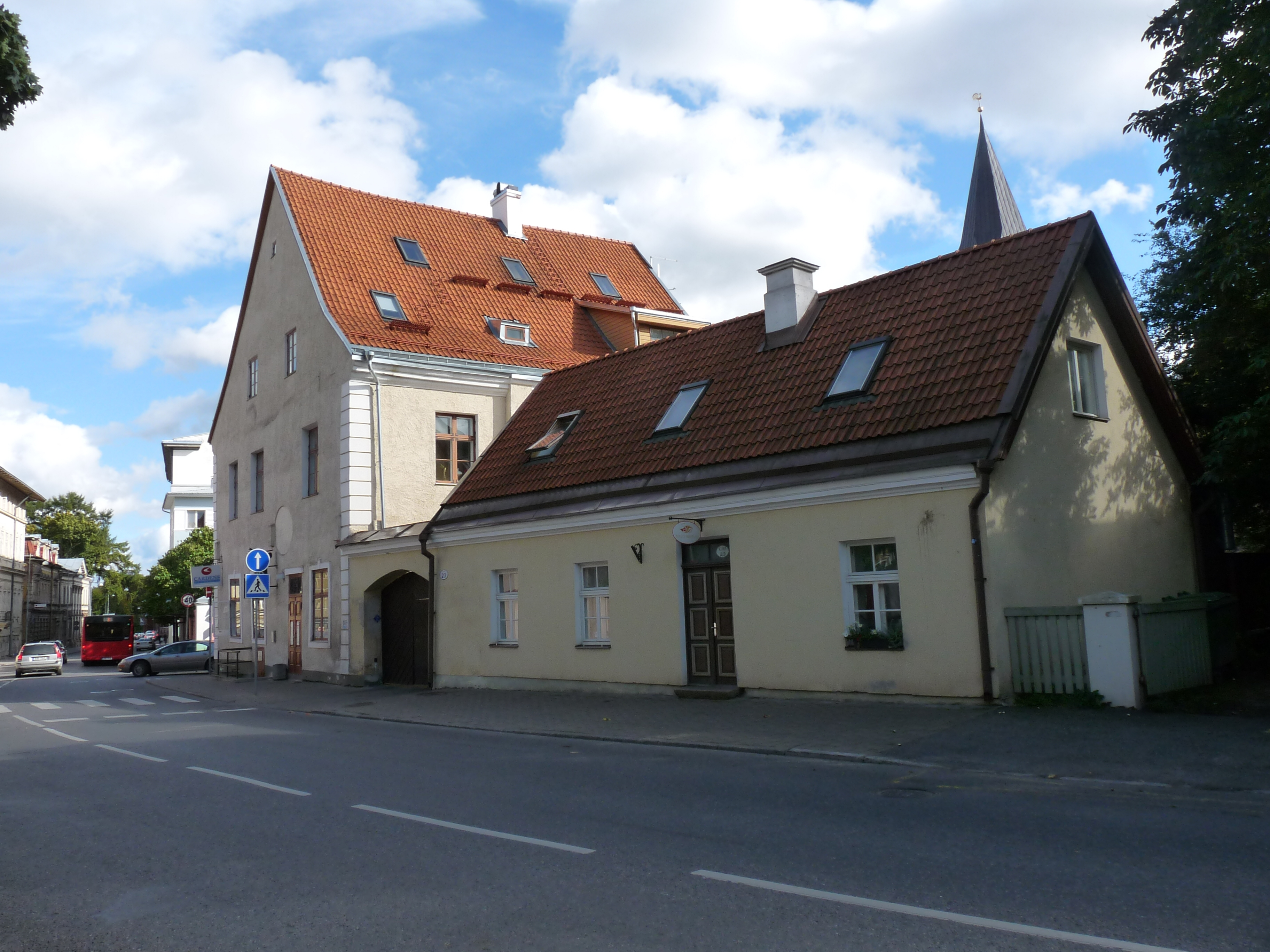 Laia tänava käänukoht Tartus, vasemal Tartu vanim maja, taamal Jaani kiriku torn, 21. september 2012